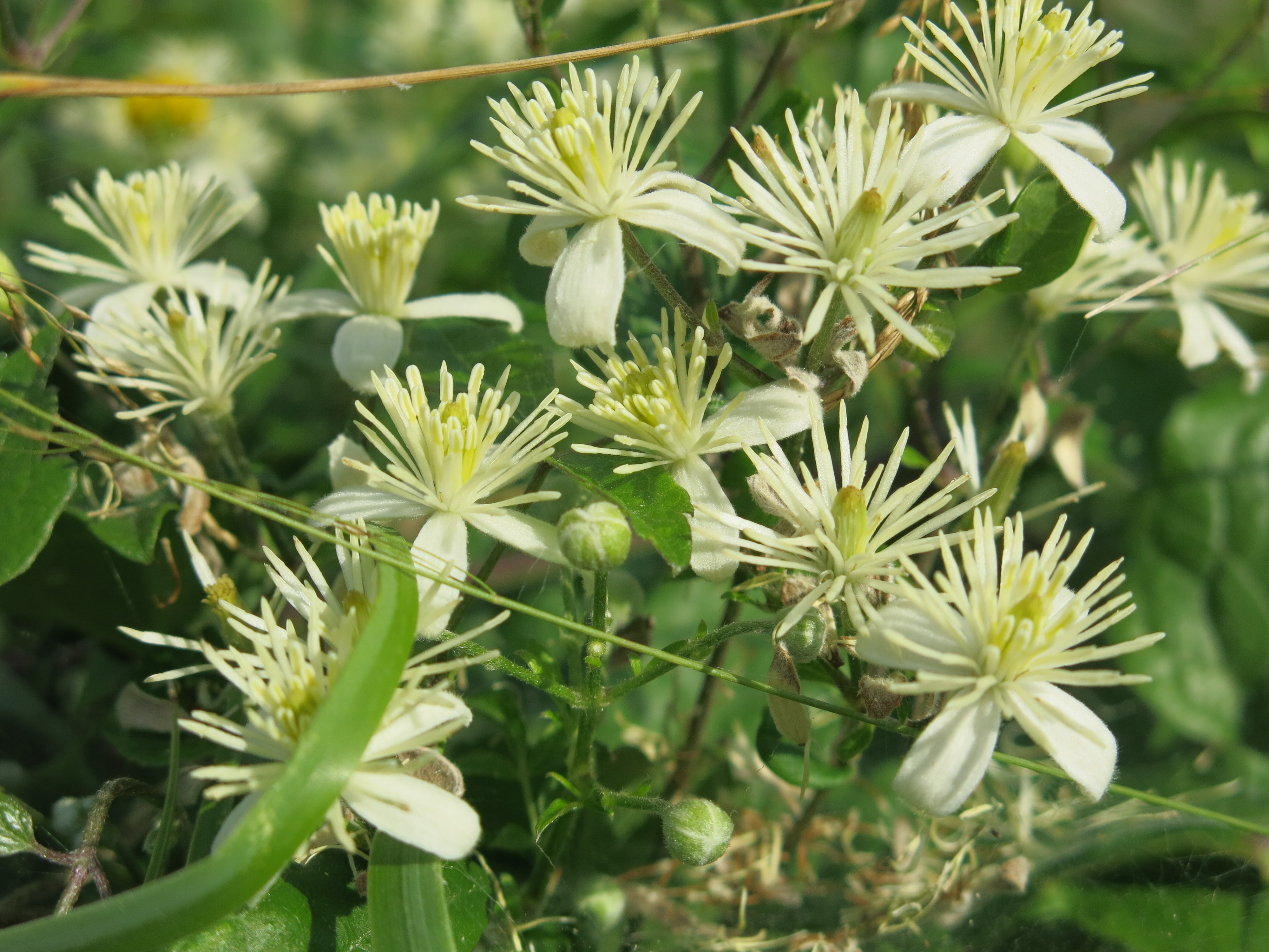 Wilde Clematis am Isarufer